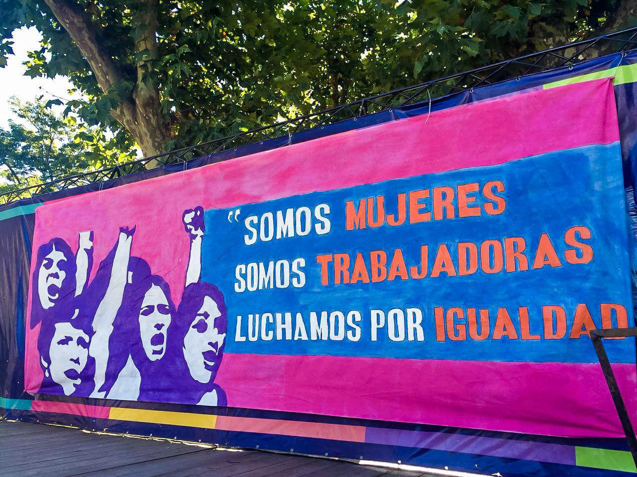 Preparativos para la movilización. San José de Mayo, Departamento de San José, Uruguay. Paro Internacional de Mujeres. Cobertura Colaborativa MediaRed. Internacional Feminista. 2018M